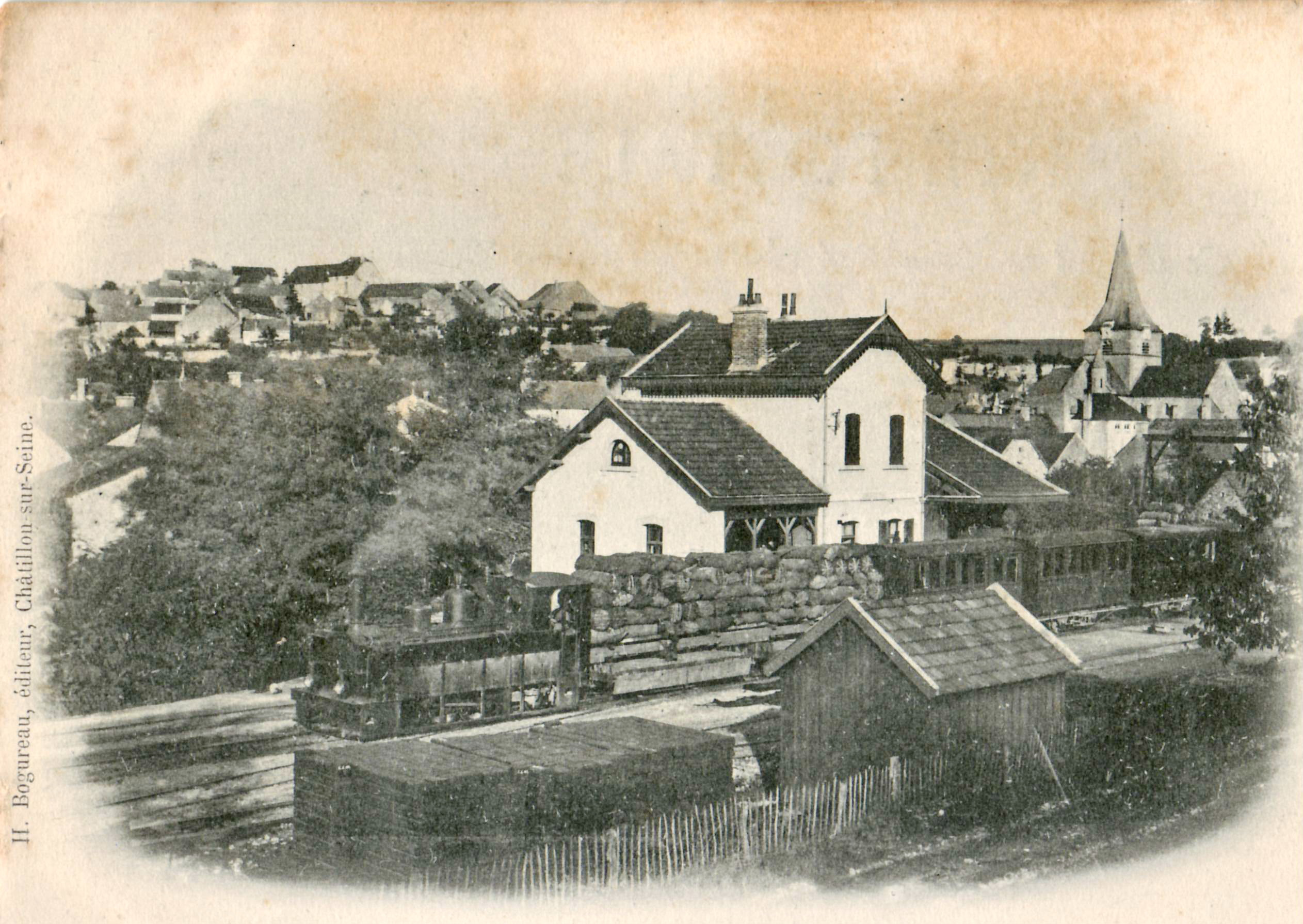 Détail de la carte postale ancienne éditée par H. Bogureau, éditeur à Châtillon-sur-Seine, n°65 :AIGNAY-LE-DUC - Gare du Tramway